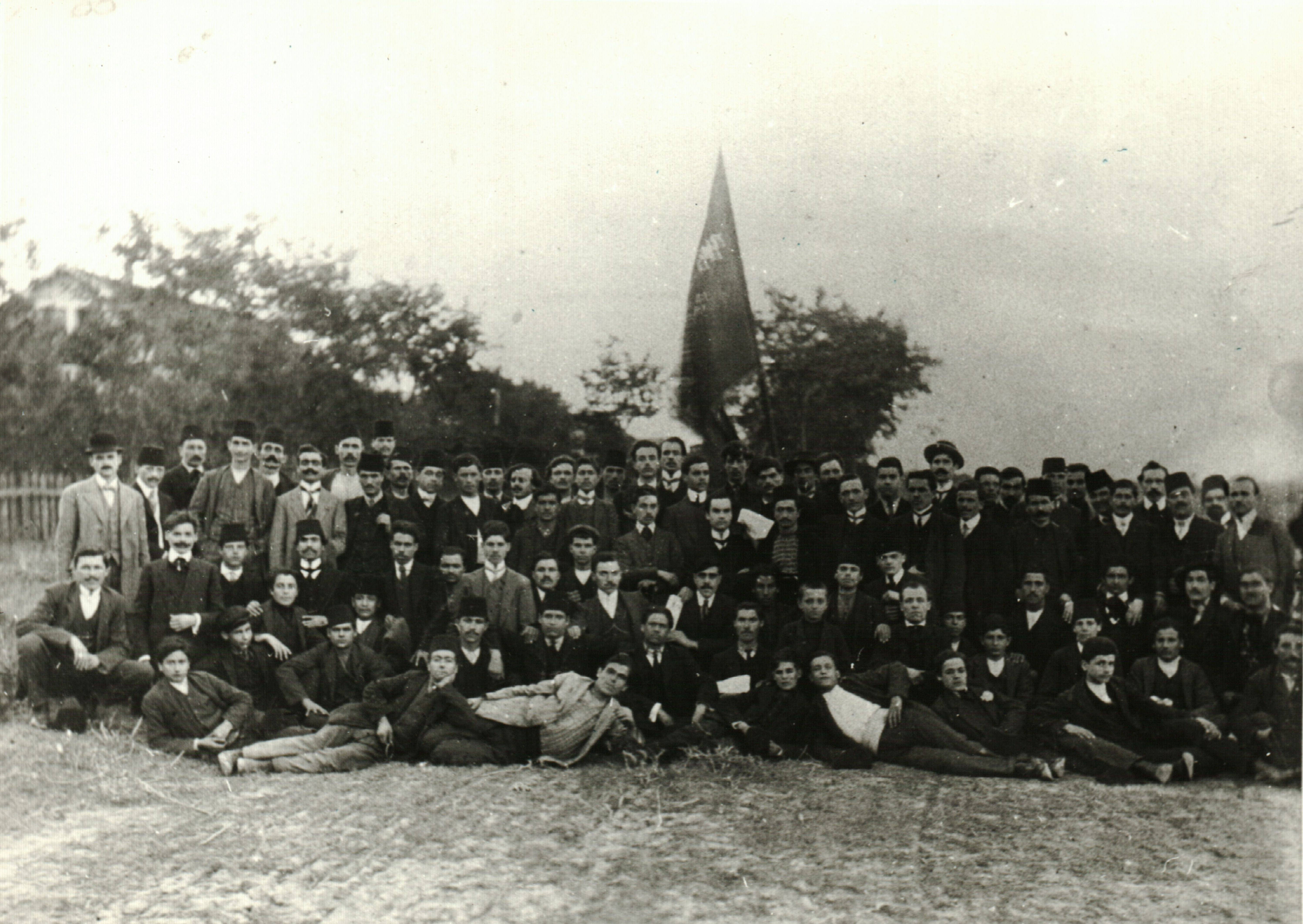 Социалистическа организация в Солун, 1910 г.